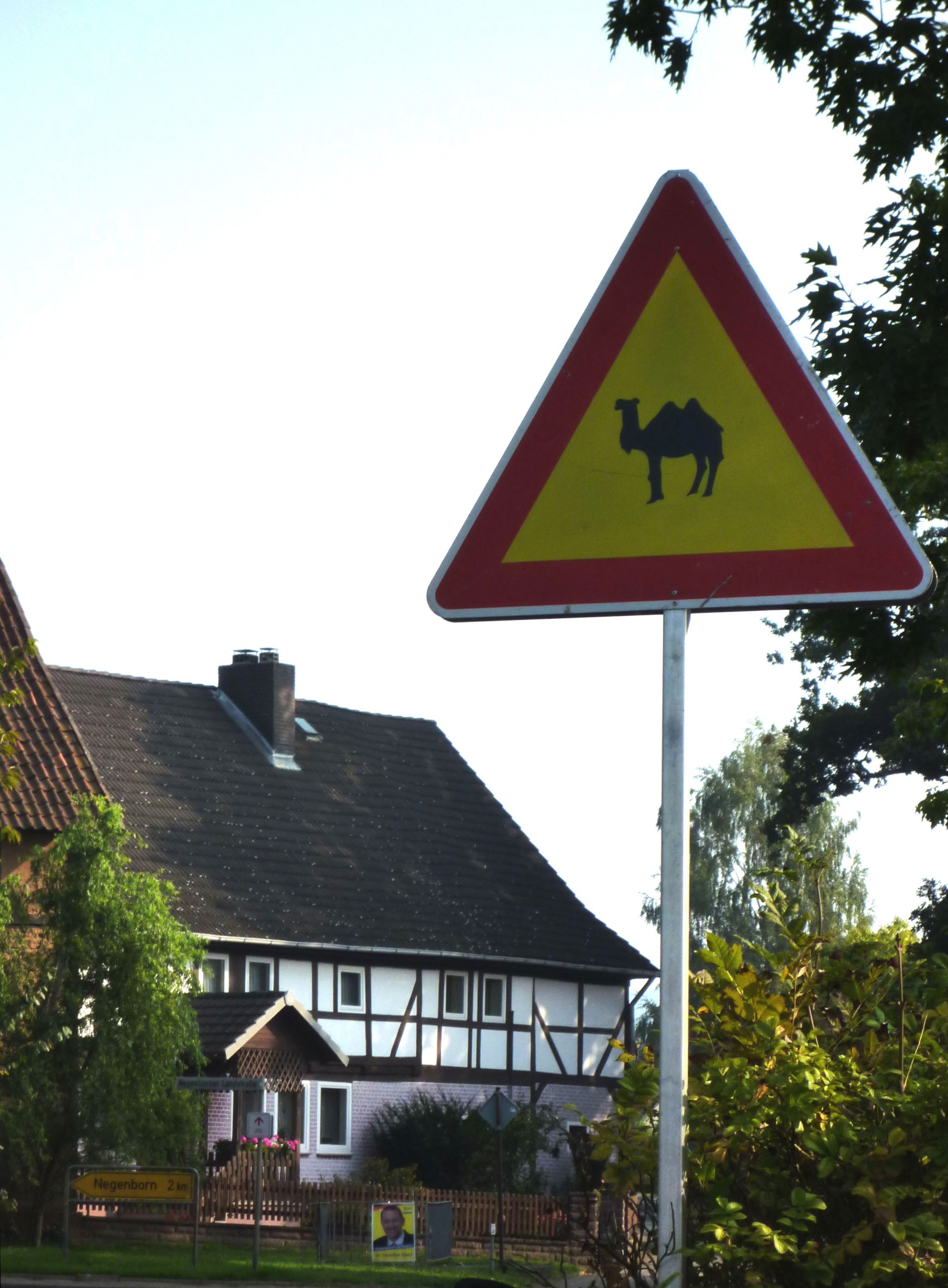 Einbeck (OT Volksen) - Kamel-Verkehrsschild an einer Straße der Umgebung